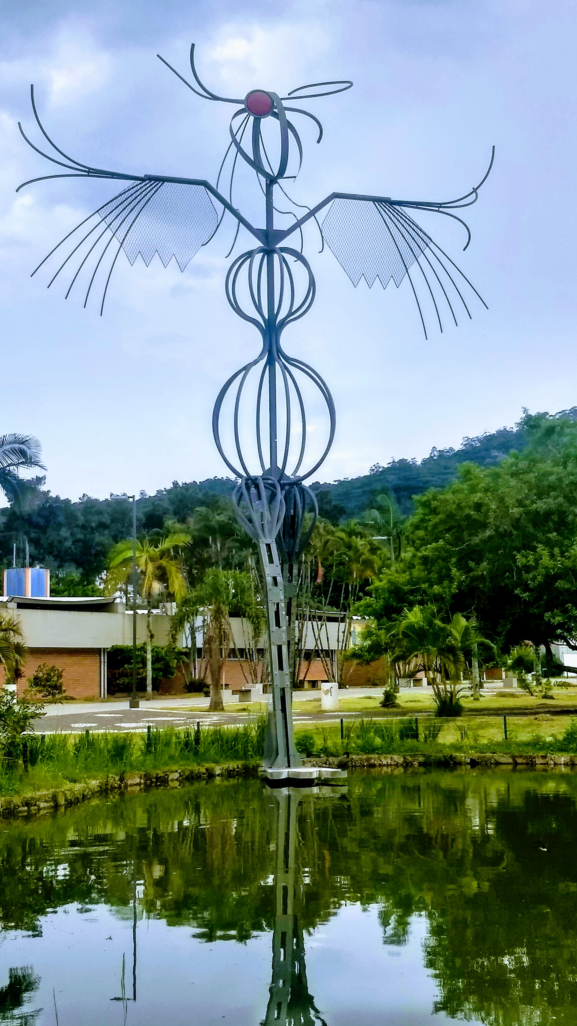 Vista a partir do lago da UFSC